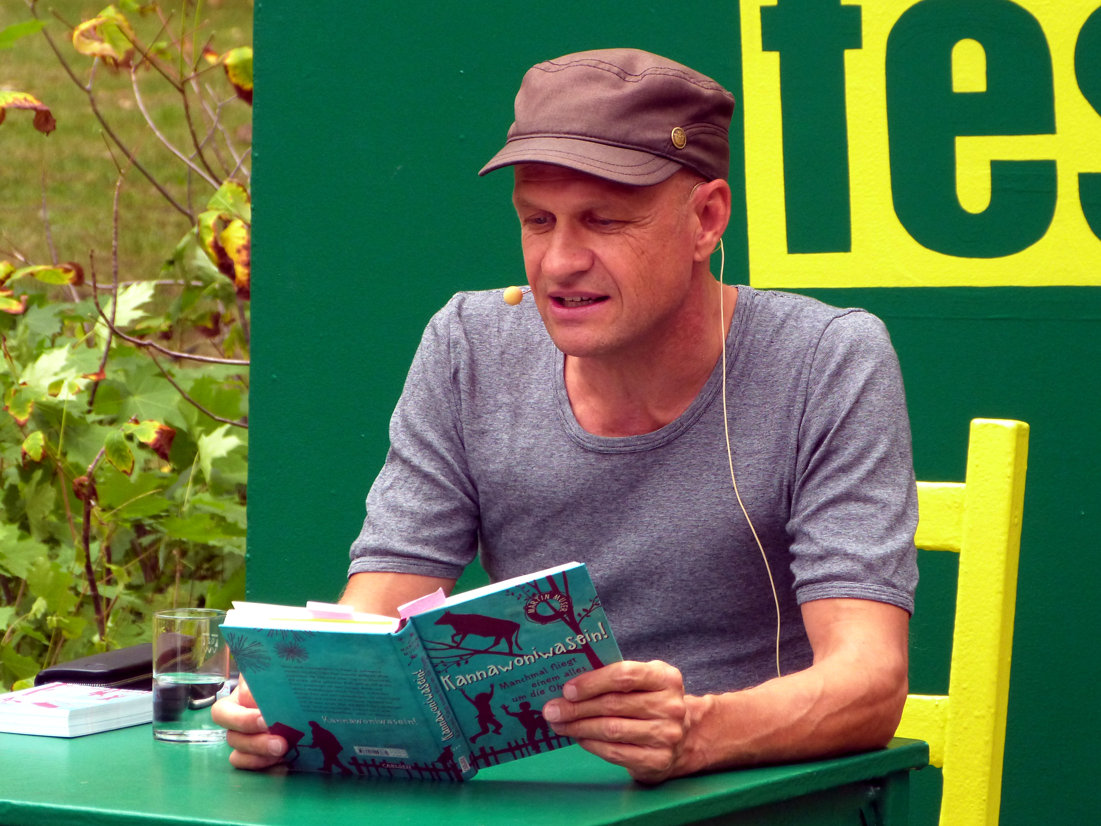 Der Autor Martin Muser bei einer Lesung auf dem Erlanger Poetenfest 2019.